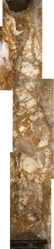 Zusammengesetztes Bild des Haupterzgangs (Schwerspat, Baryt) des Bergwerks Suggental